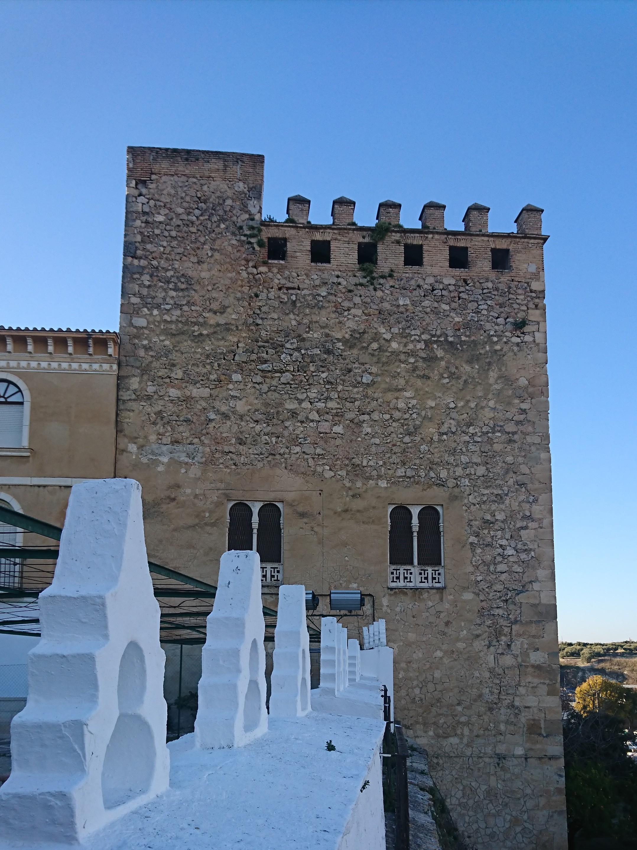 Castillo de Cabra, Córdoba